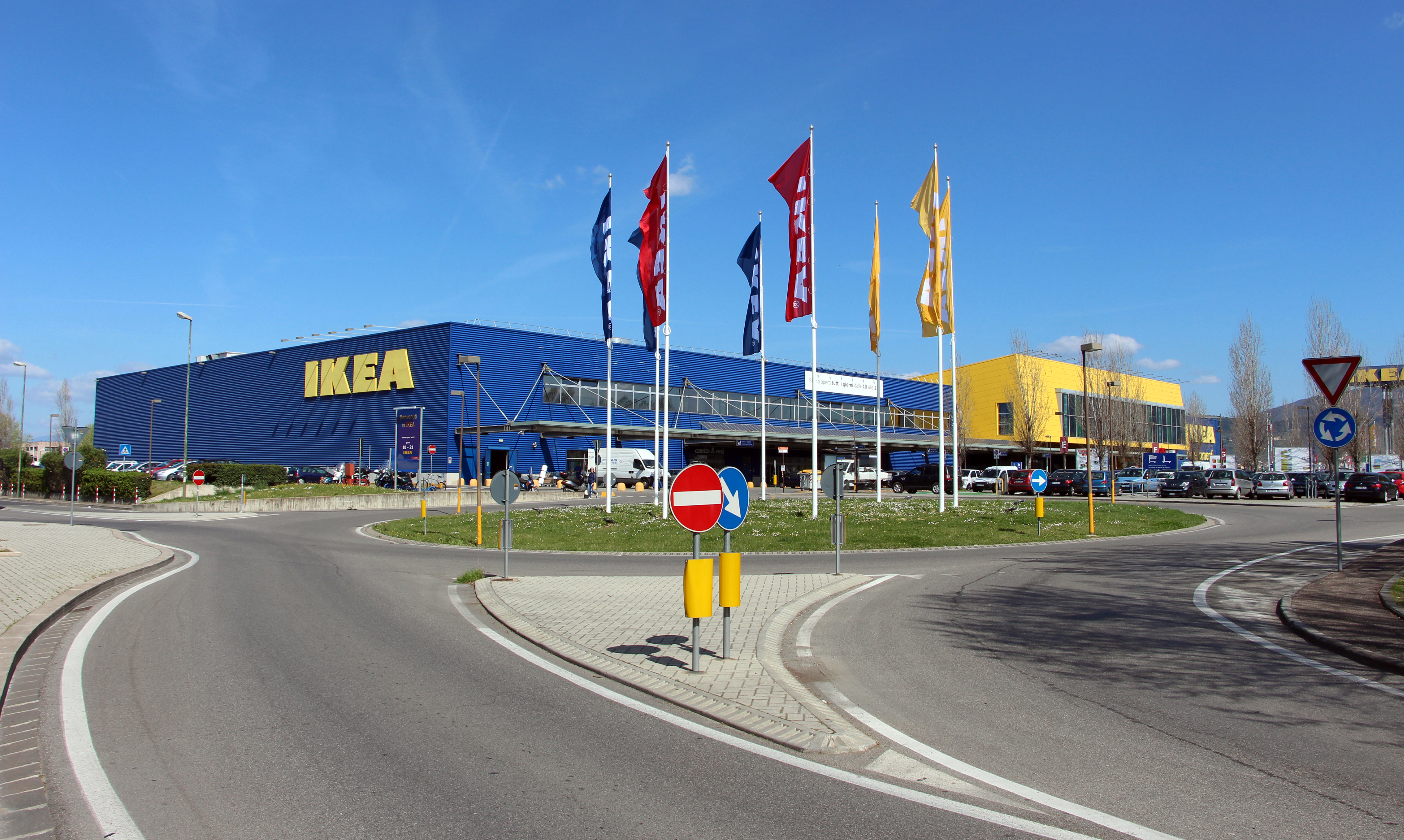 Sesto fiorentino, ikea (osmannoro)